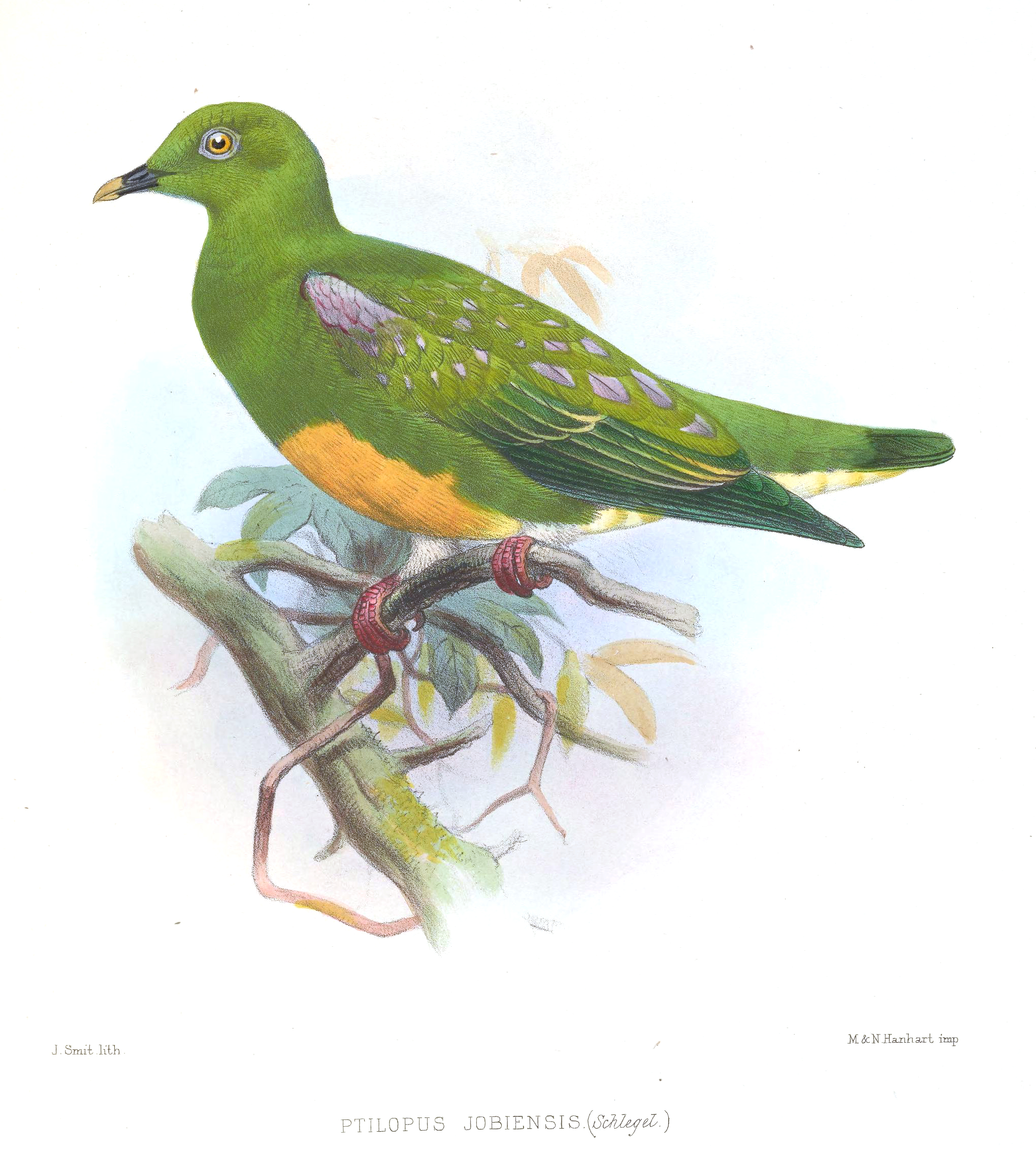 Ptilinopus iozonus jobiensis